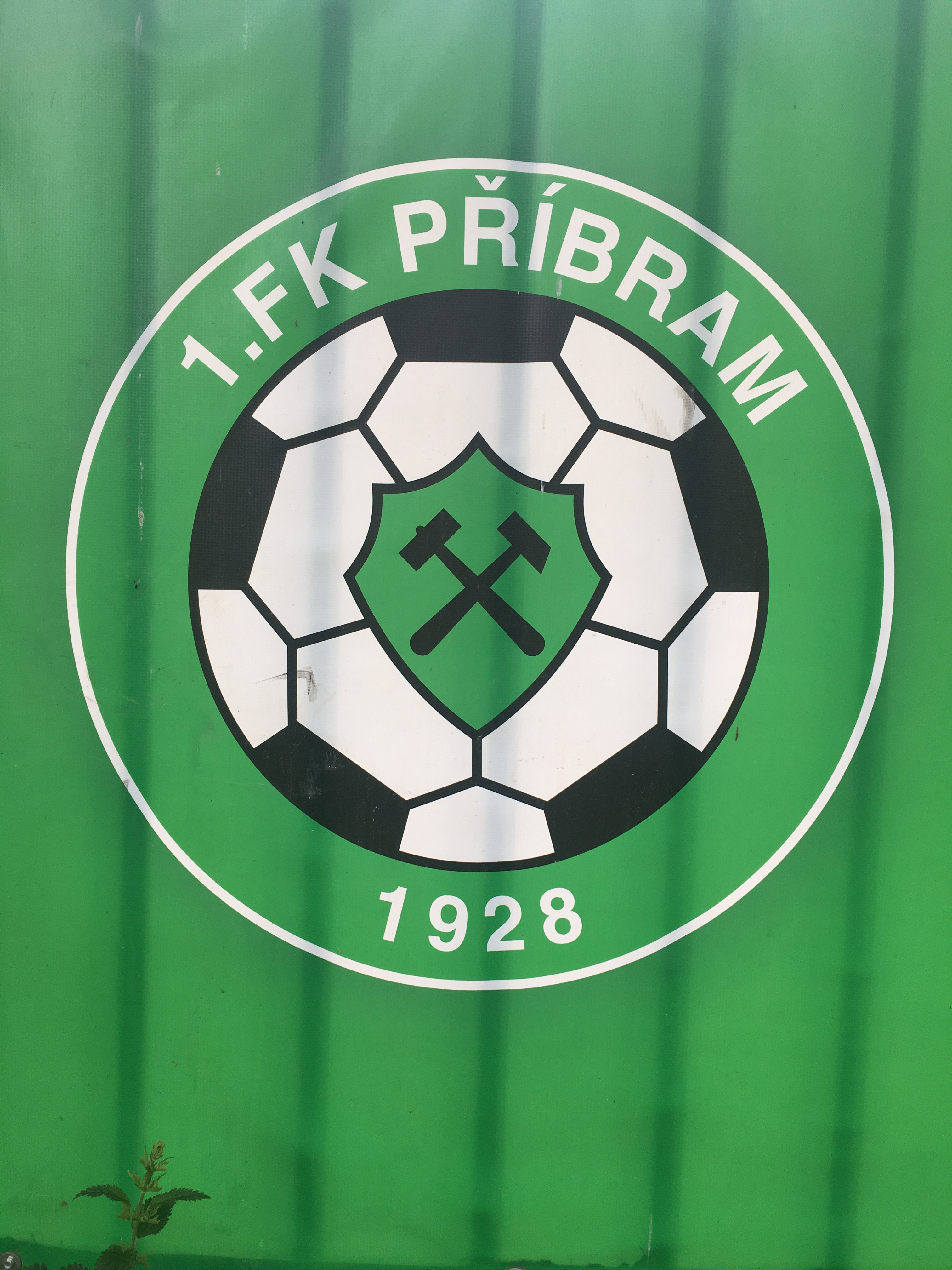 Boční vchod, znak klubu